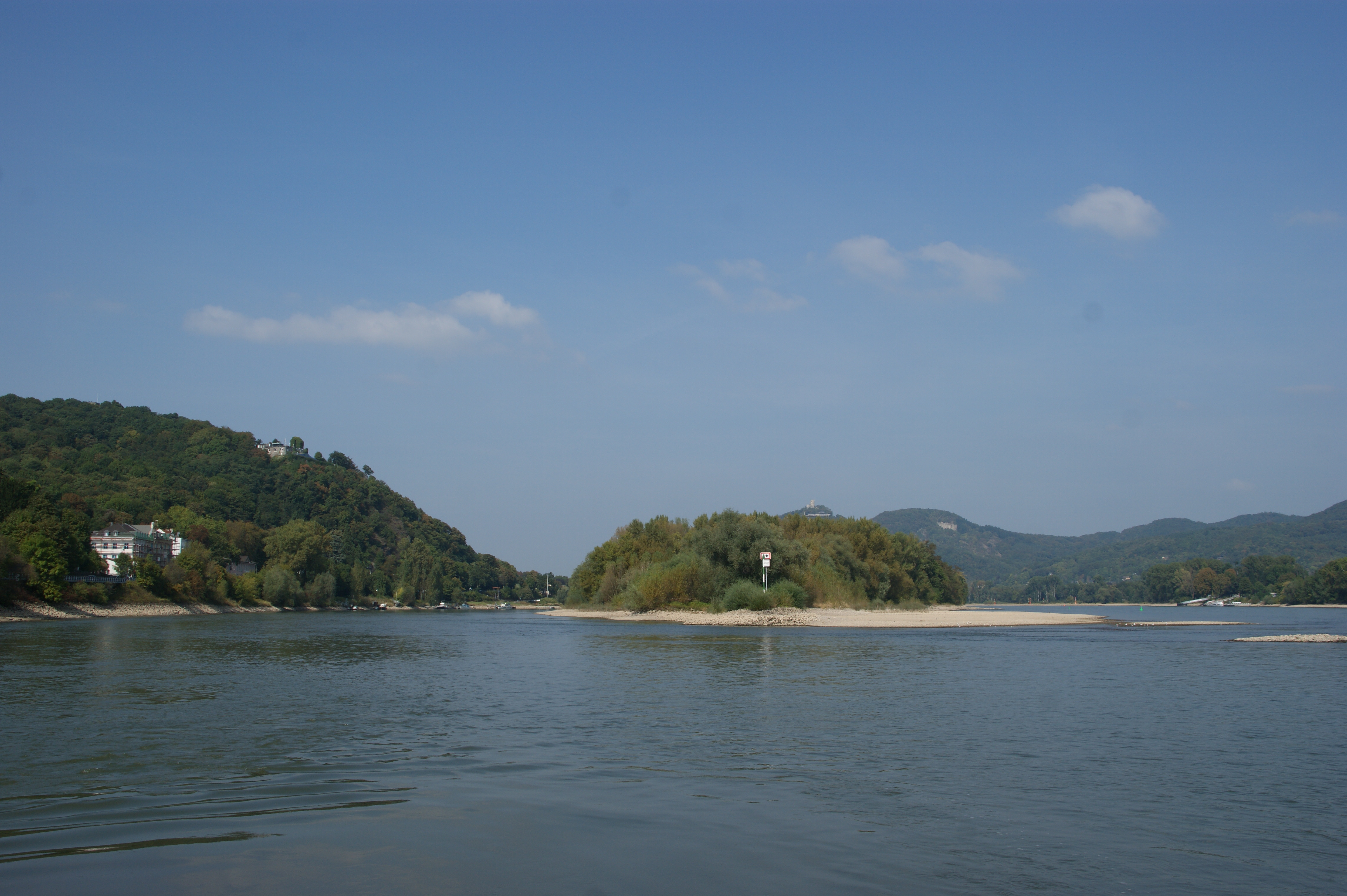 Südende der Insel Nonnenwerth vom Fähranleger aus gesehen